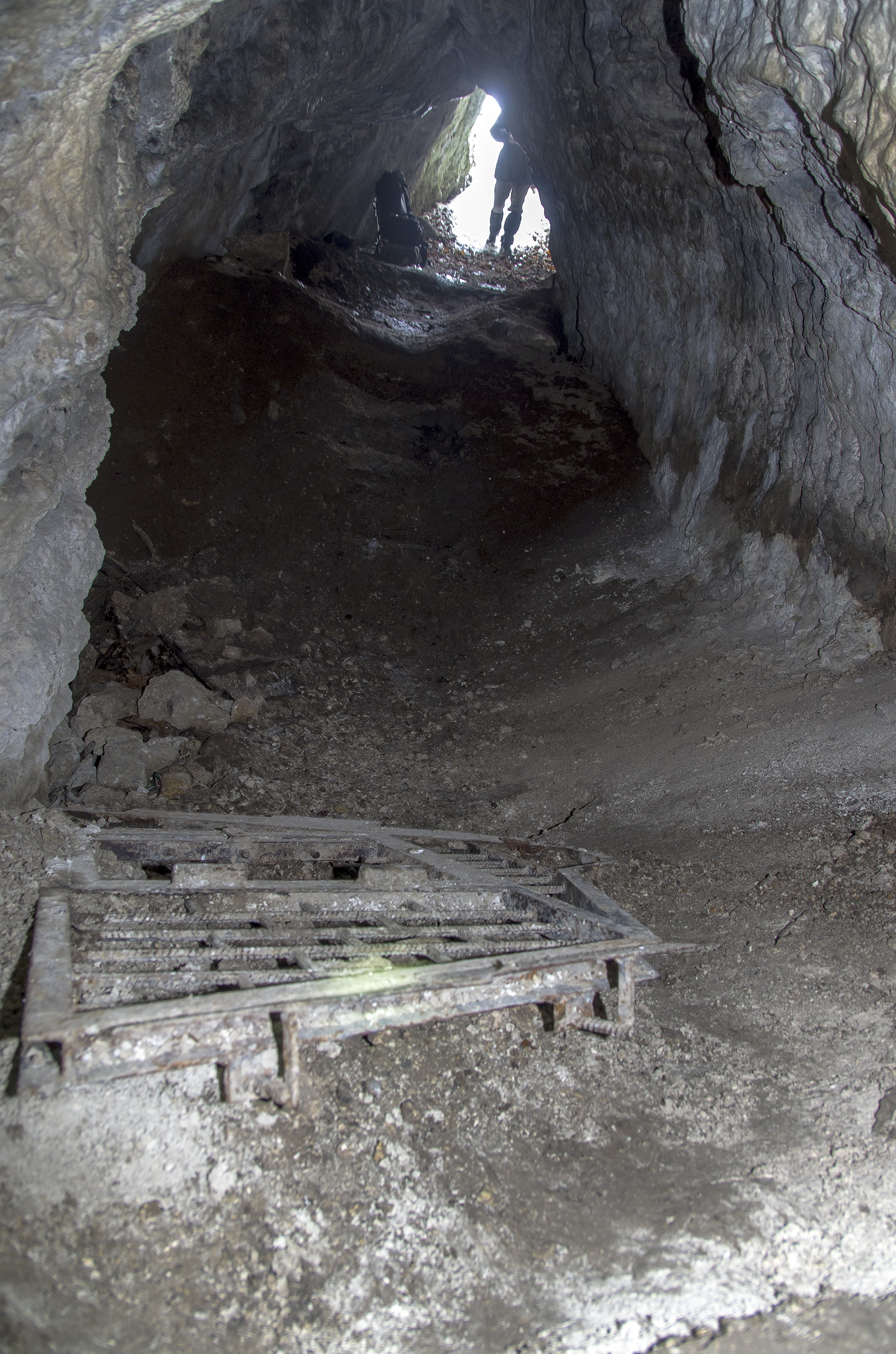 Jaskinia Zegar w Dolinie Wodącej